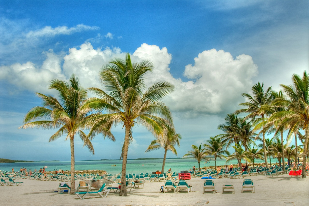 Beaches in Nassau, Bahamas.